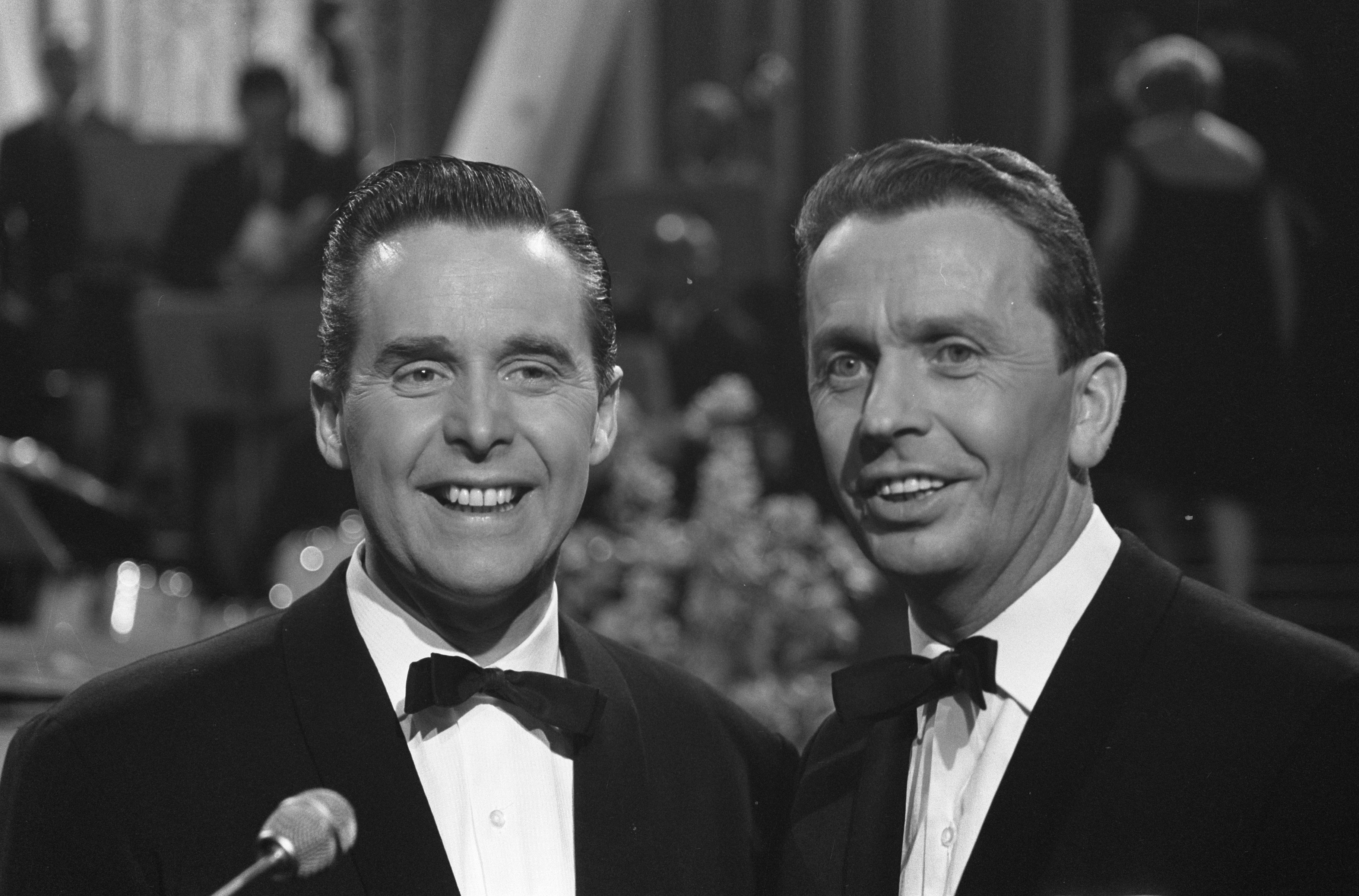 Collectie / Archief : Fotocollectie Anefo Reportage / Serie : [ onbekend ] Beschrijving : Nationale Finale Song Festival in Concordia te Bussum. De spelbrekers 4+5, Joke van den Burg 3 Datum : 27 februari 1962 Locatie : Bussum Persoonsnaam : Concordia, Nationale Finale Song Festival Fotograaf : Pot, Harry / Anefo Auteursrechthebbende : Nationaal Archief Materiaalsoort : Negatief (zwart/wit) Nummer archiefinventaris : bekijk toegang 2.24.01.05 Bestanddeelnummer : 913-5754 Reacties Geplaatst door Maaike op 19 juli 2012 - 21:07. Persoonsnamen: Theo Rekkers en Huug Kok (De Spelbrekers)